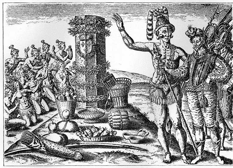 Titel: Indianer entrichten Abgaben an Franzosen. Kupferstich. Erklärung: Dargestellt werden frz. Europäer (erkennbar an dem Lilienwappen), Rüstung und Kleidung gehören ins ausgehende 16. bzw. Anfang des 17. Jh.